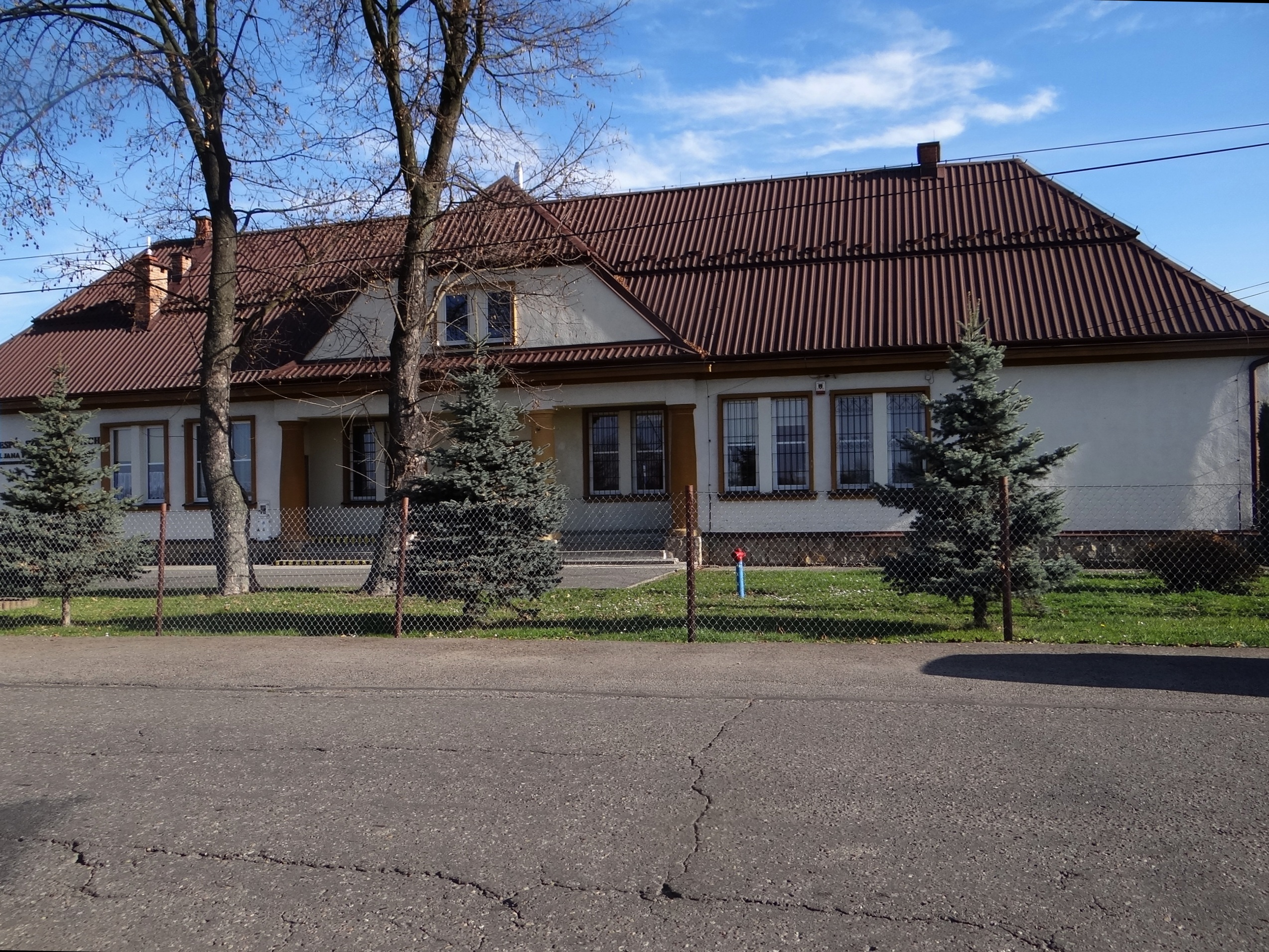 Dawny dwór, obecnie budynek szkoły muzycznej w Nieszkowicach Małych